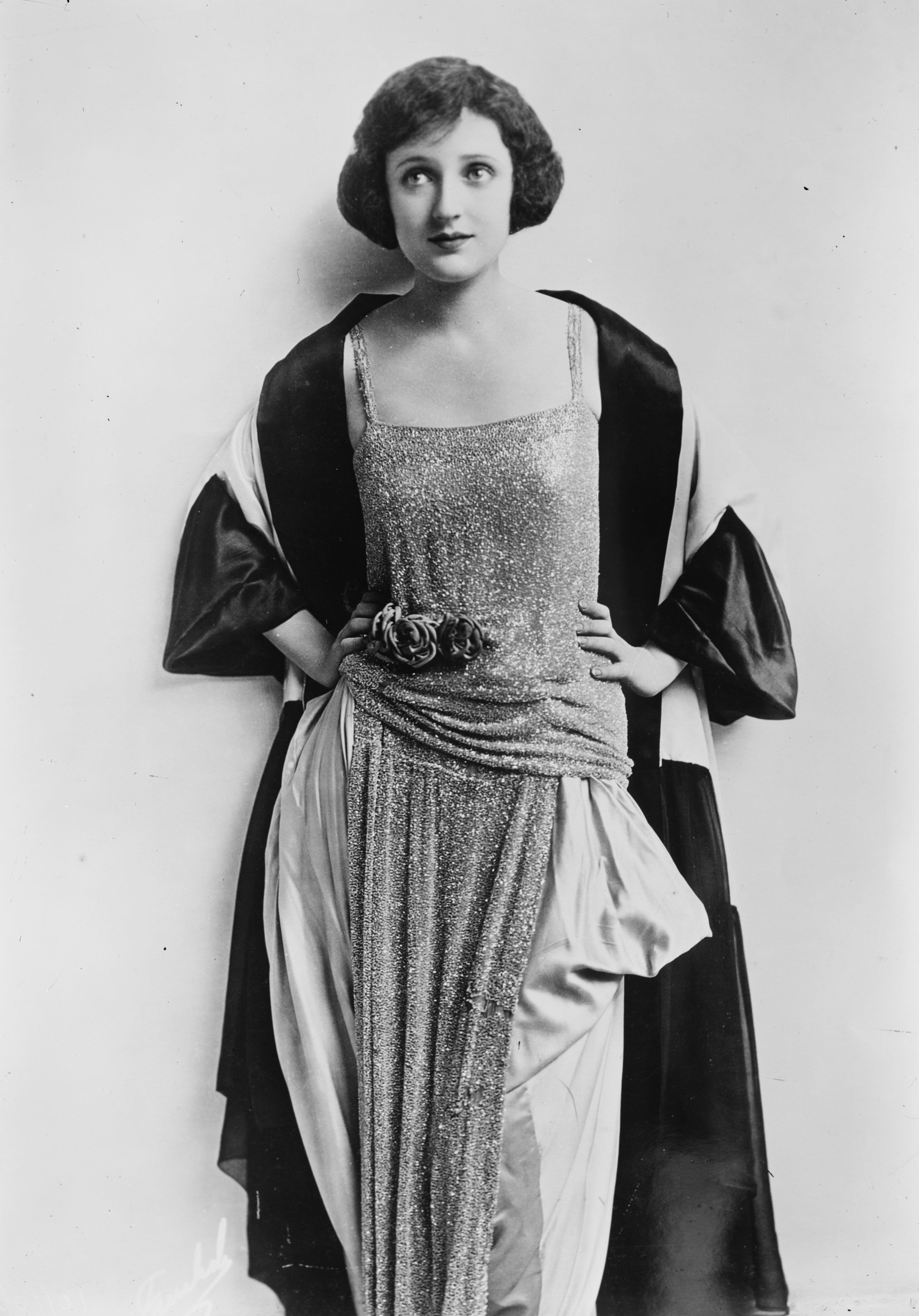 Actress Carmel Myers